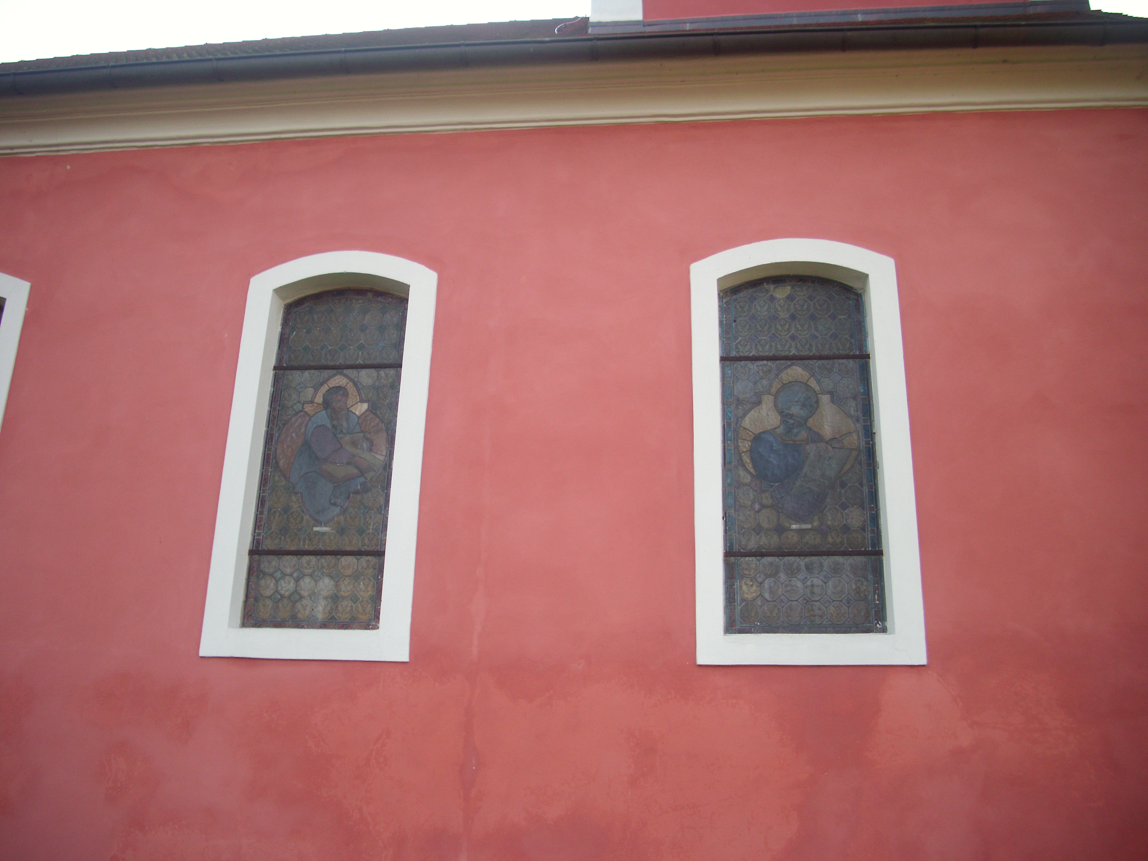 Bleiglasfenster der Kirche Krügersdorf, Beeskow, Brandenburg